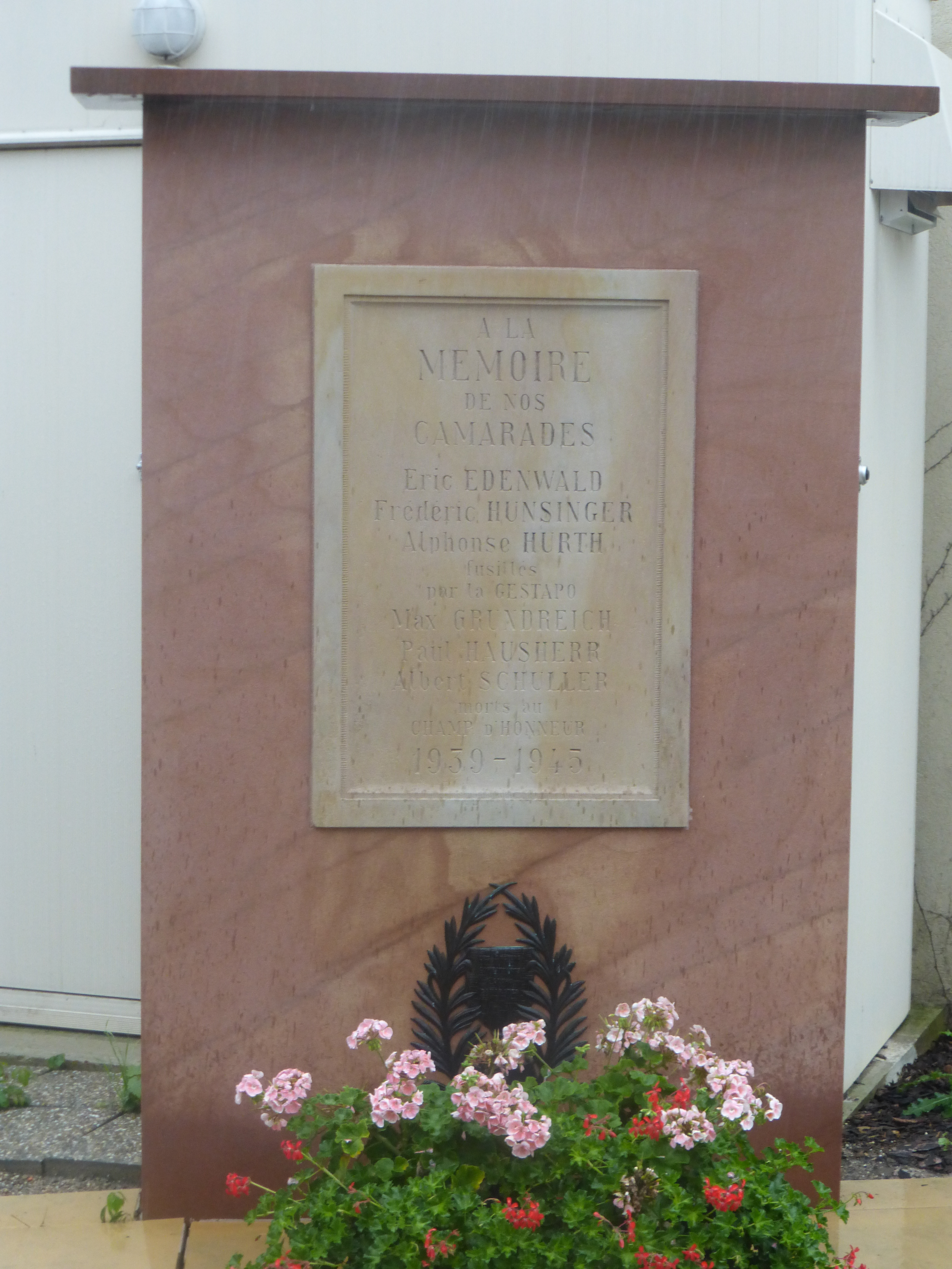 La liste des fusillés par la Gestapo comporte les noms de Eric Edenwald, Frédéric Hunsinger et Alphonse Hurth. Celle des morts au combat, Max Grundreich, Paul Hausherr et Albert Schuller. Le monument se trouve dans la cour du commissariat central de la police nationale de Colmar (Haut-Rhin).